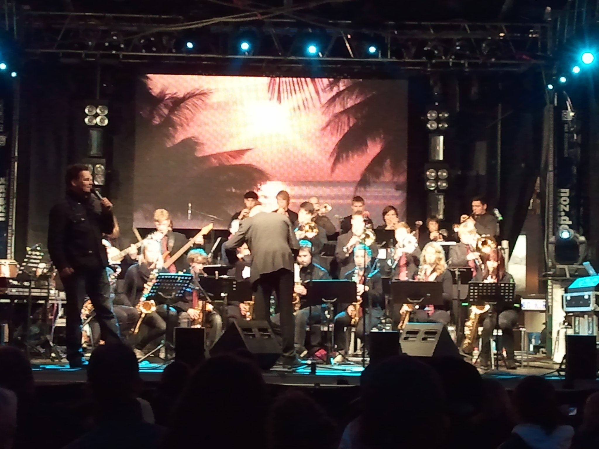 Die Mettinger KvG-Bigband beim Auftritt auf der Maiwoche 2011 in Osnabrück, Niedersachsen, Deutschland.